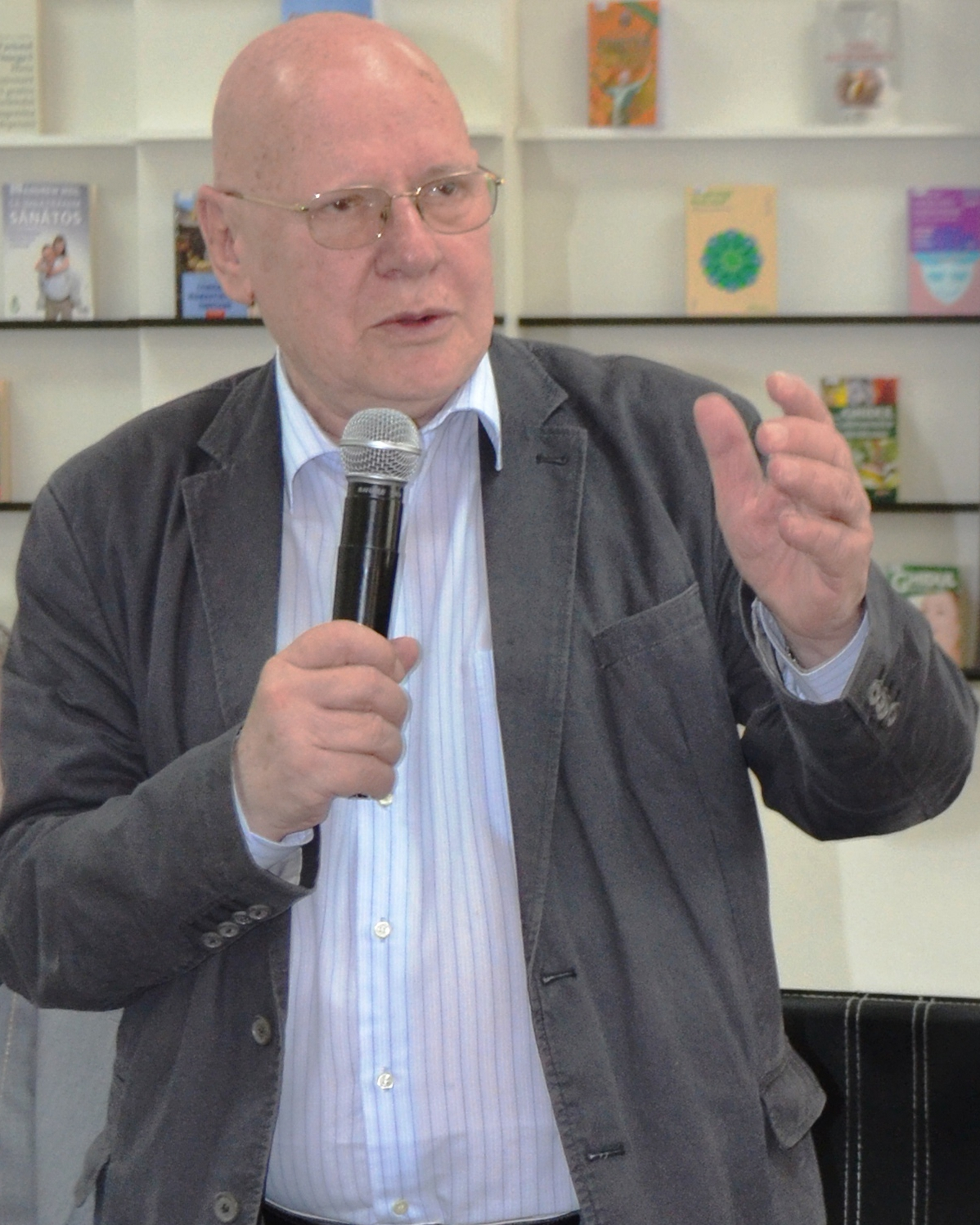 Răzvan Theodorescu